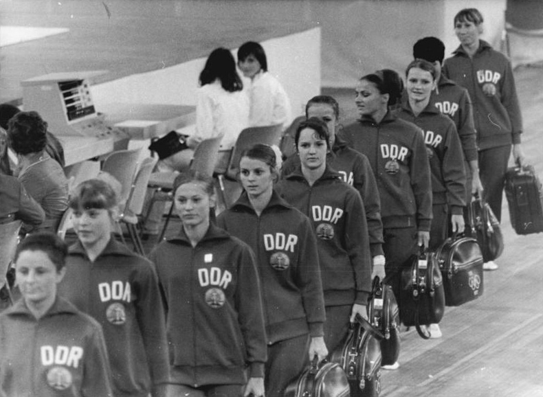 PI-Olympia-Gahlbeck-22.8.1972-ma-München: XX. Olympische Sommerspiele. Einmarsch der DDR-Turnerinnen zum öffentlichen Training in der Sporthalle des Olympiaparks in München. Von links nach rechts sind zu erkennen: Trainerin Roselore Sonntag, Christine Schmitt, Angelika Hellmann, Sylvia Schäfer, Irene Abel, Ricarda Schmeißer, Erika Zuchold, Karin Janz, Mannschaftsarzt Frau Dr. Arndt und Masseuse Gerlinde Pruß.